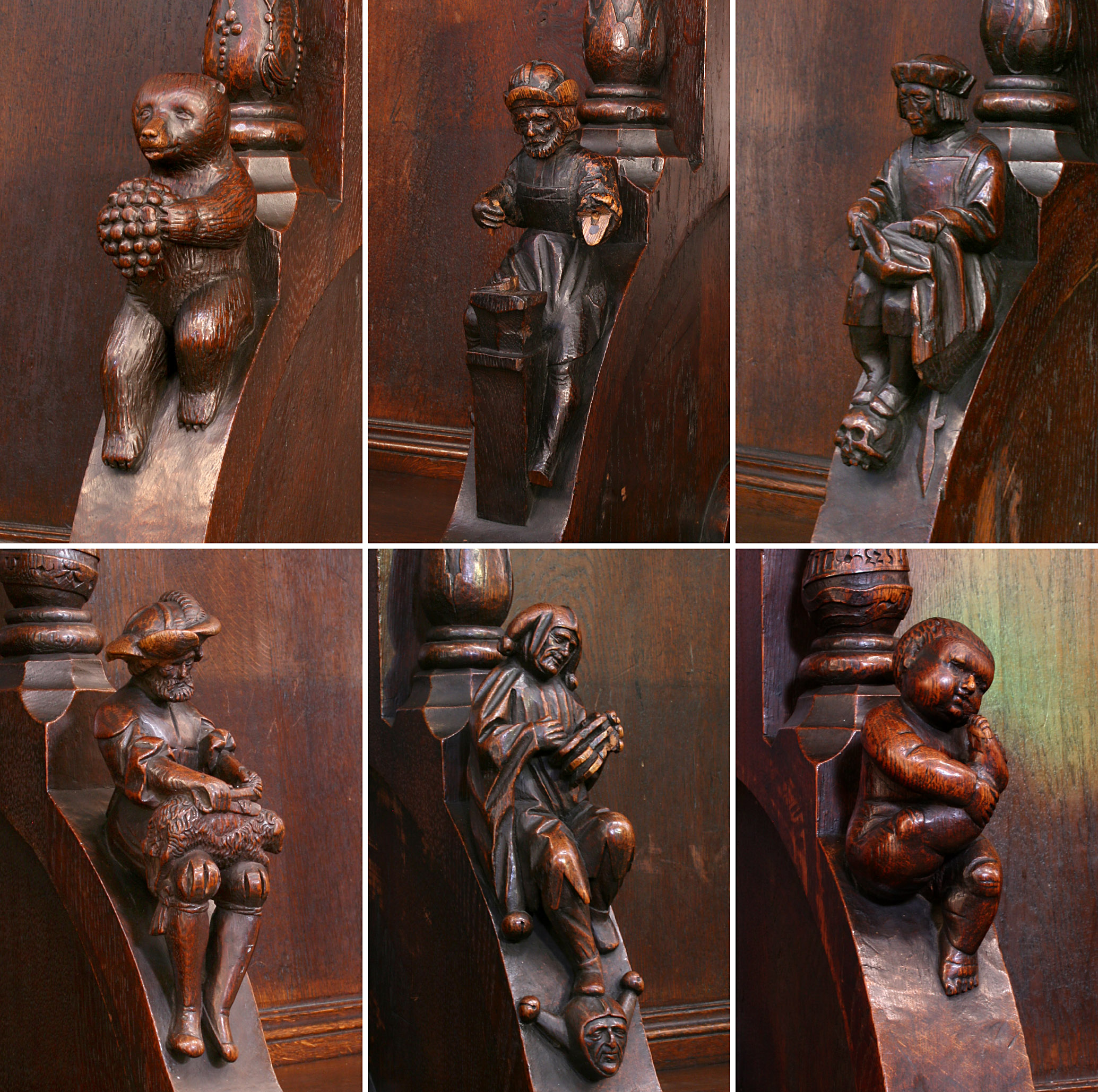 Chorgestühl im Berner Münster, Bern, Schweiz